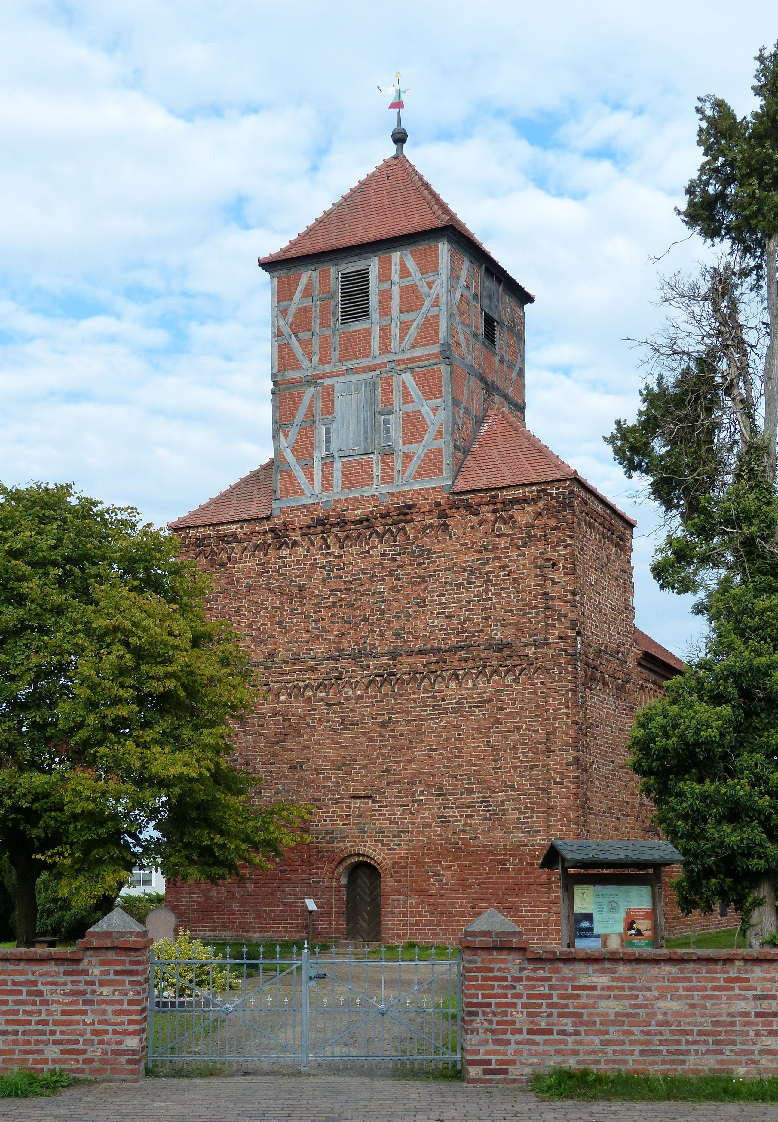 St. Annen ist die älteste romanische Backsteinkirche im Umfeld des Klosters Jerichow (urkundlich 1172 bezeugt). Abweichend von den Kirchen der Umgebung ist der Westturm erst später dazugekommen. Im rechteckigem Grundriss erreicht er nur die Firsthöhe des Kirchenschiffs. Vielleicht schon der Ersatz eines früheren Turmes? Das quadratische Fachwerktürmchen ist erst seit 1686 verbürgt.